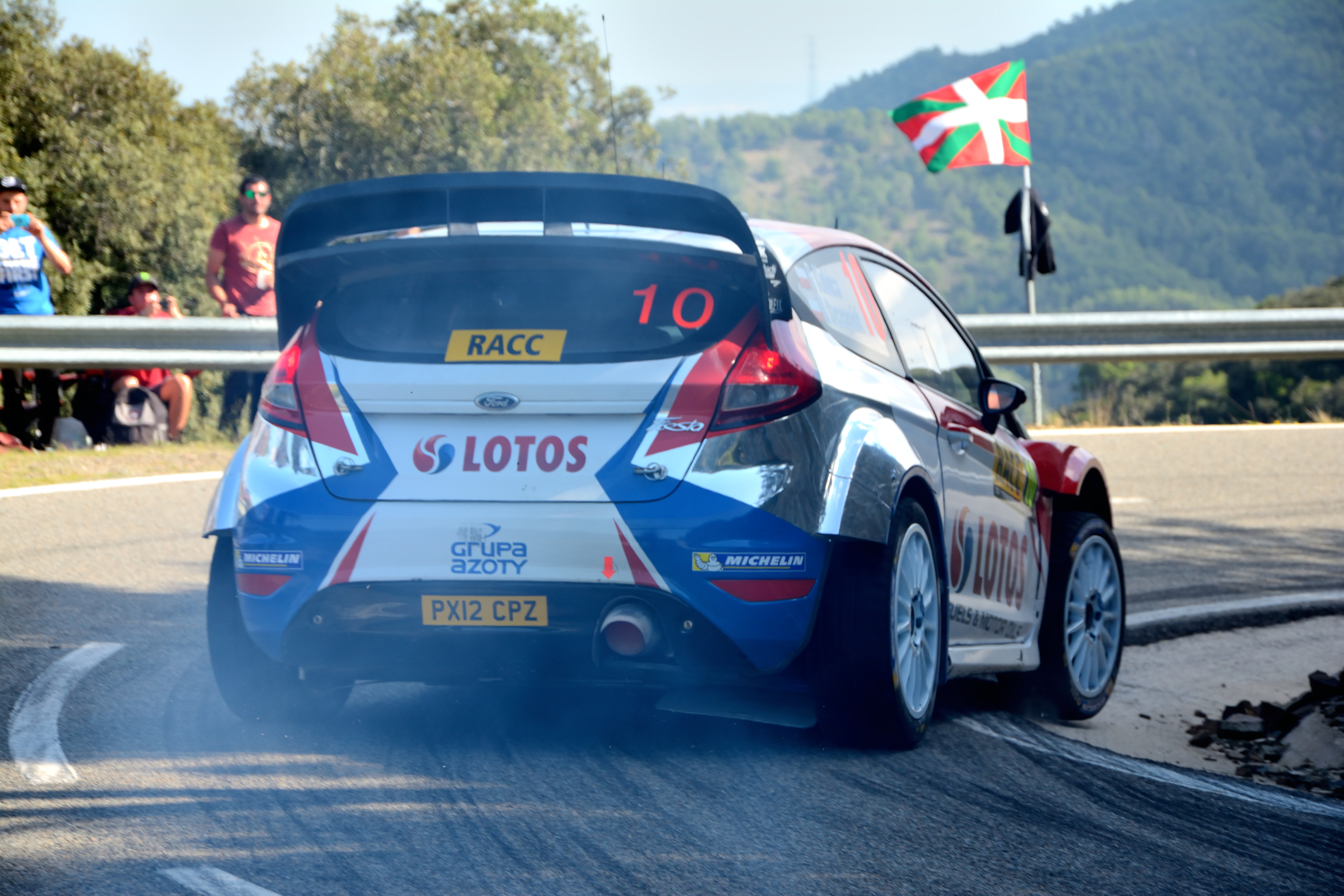 Duesaigües, 43773, Tarragona, Spain